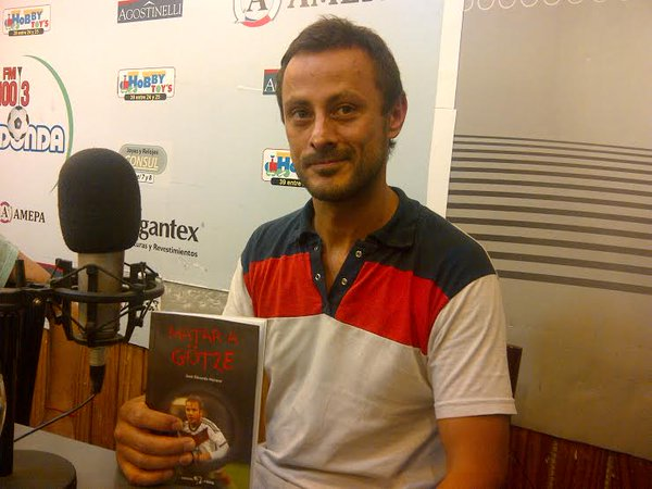 José Eduardo Moreno en una entrevista en la radio La Redonda